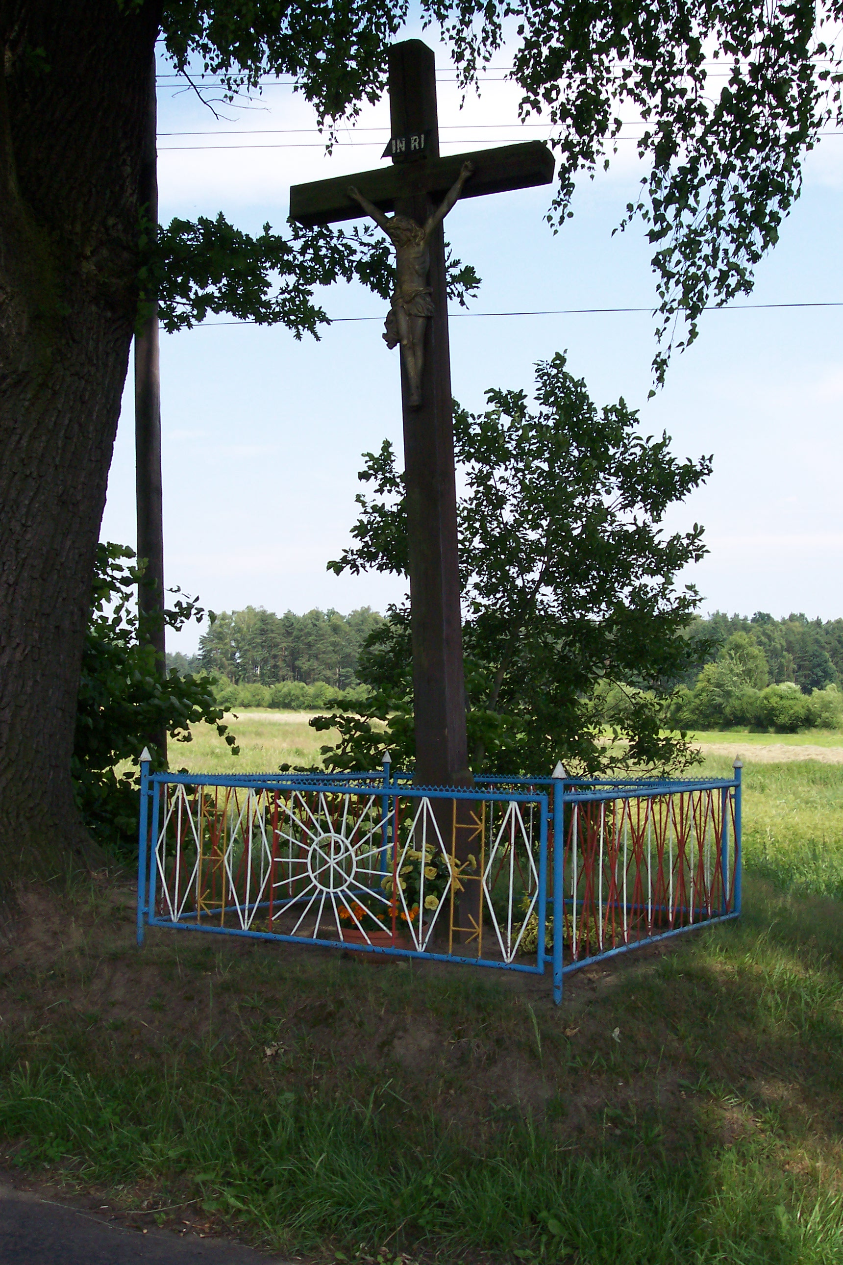 Krzyż przydrożny w Bąkach (woj. opolskie)